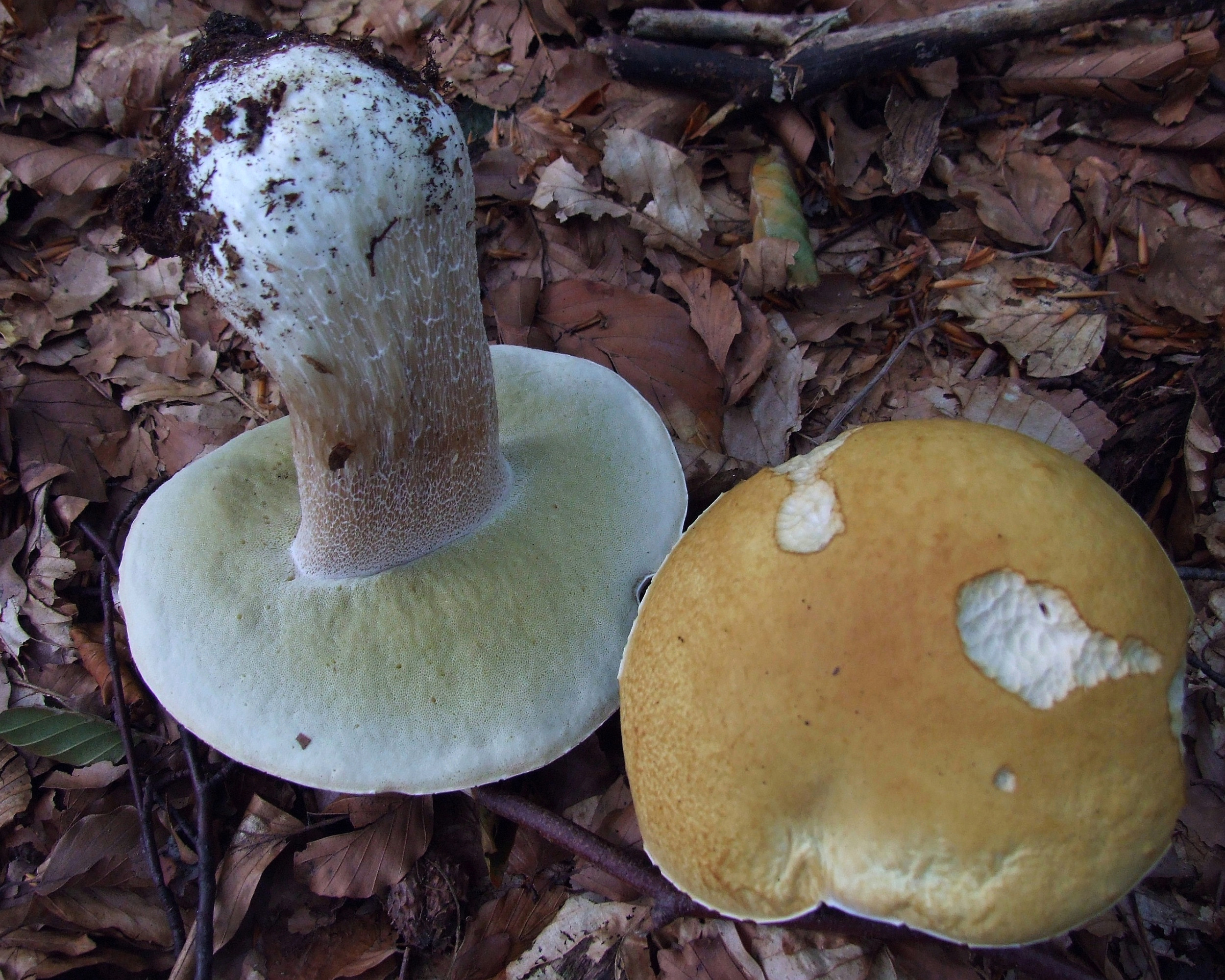 Boletus edulis (habitat:Bieszczady, Smerek)